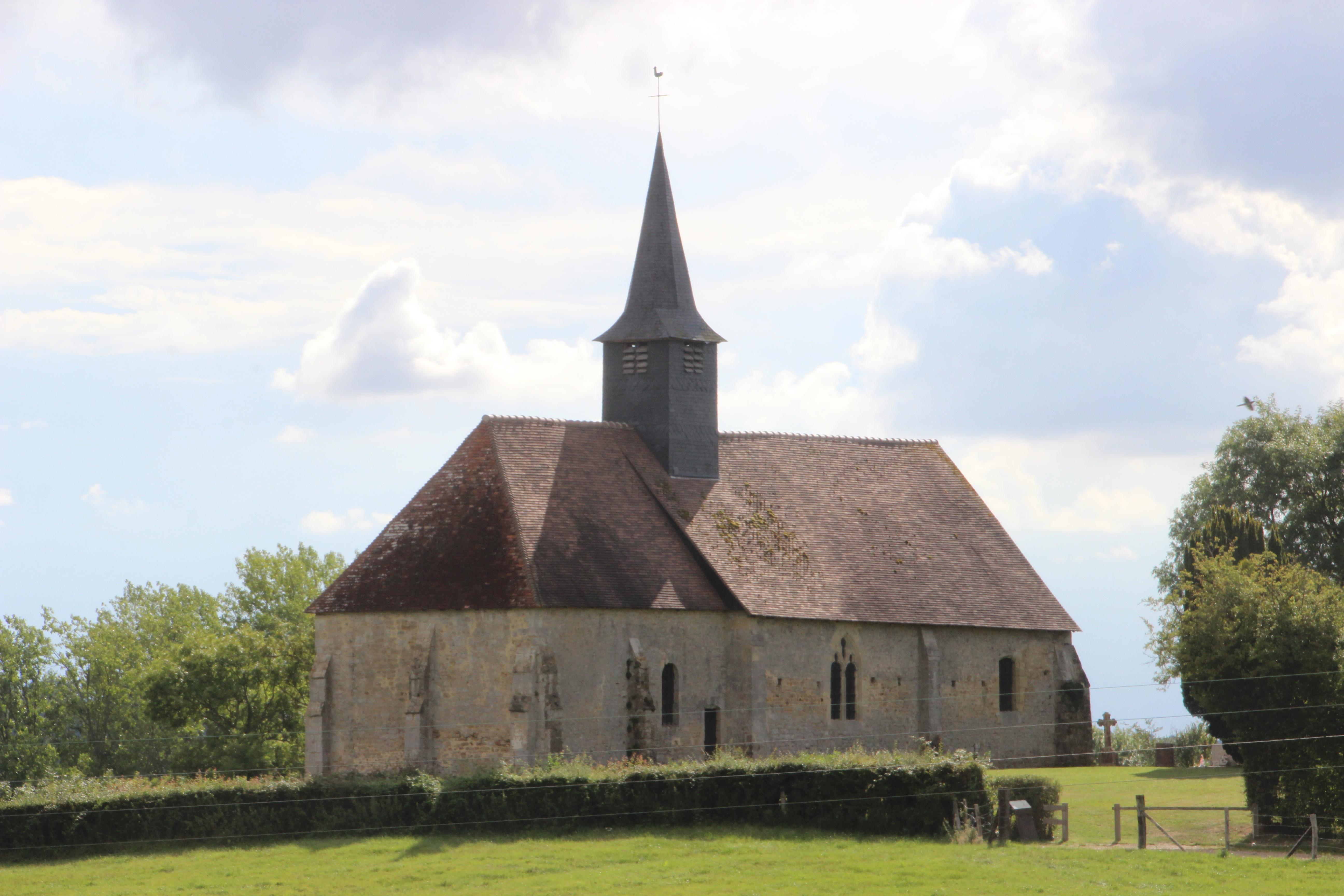 église Notre-Dame-de-Livaye